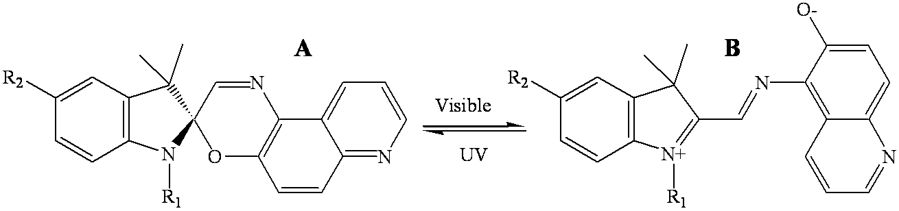 Exemple de molécule photochromique. Auteur : Frédéric Chaput, réalisé avec un programme de dessin. Licence GFDL Frédéric Chaput